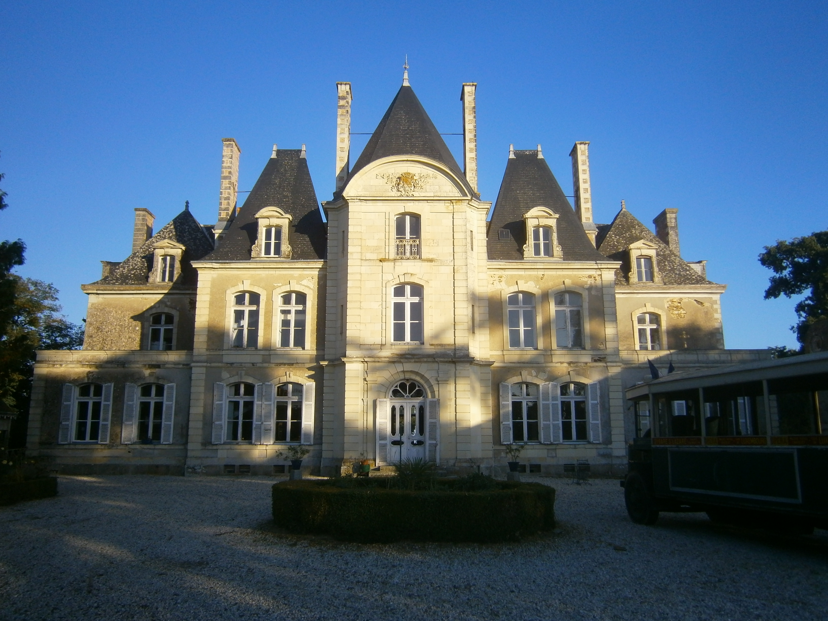 Façade ouest du château de Noirieux à Saint-Laurent-des-Mortiers (Mayenne, France).